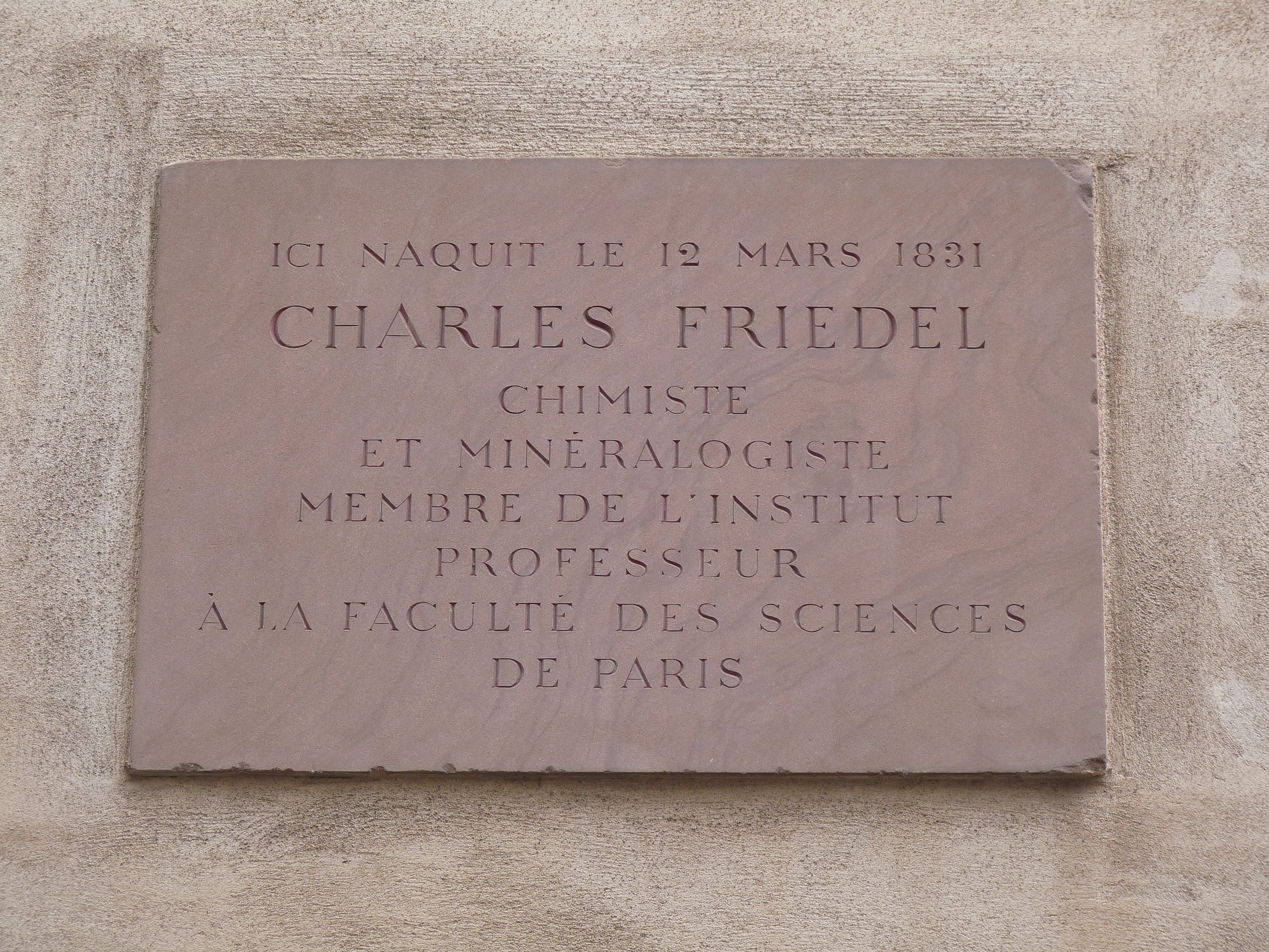 Strasbourg : Hôtel Brackenhoffer, 11 rue de l'Epine. 1731. Les portes sur rue et sur cour ont été inscrites aux Monuments historiques en 1934. Plaque commémorant la naissance de Charles Friedel.